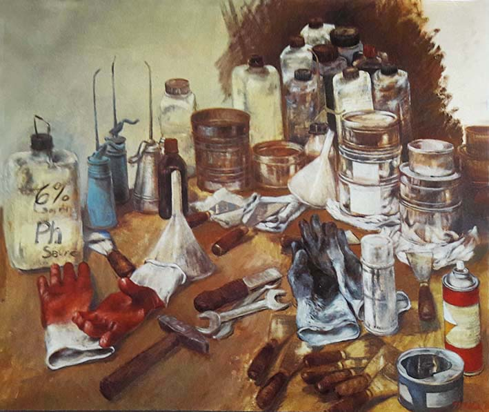 Serie : Druckereibilder, Druckereibilder IX, 1978, 90 x 105 cm, Öl auf Leinwand, Bez. u.r. “Timner 78”